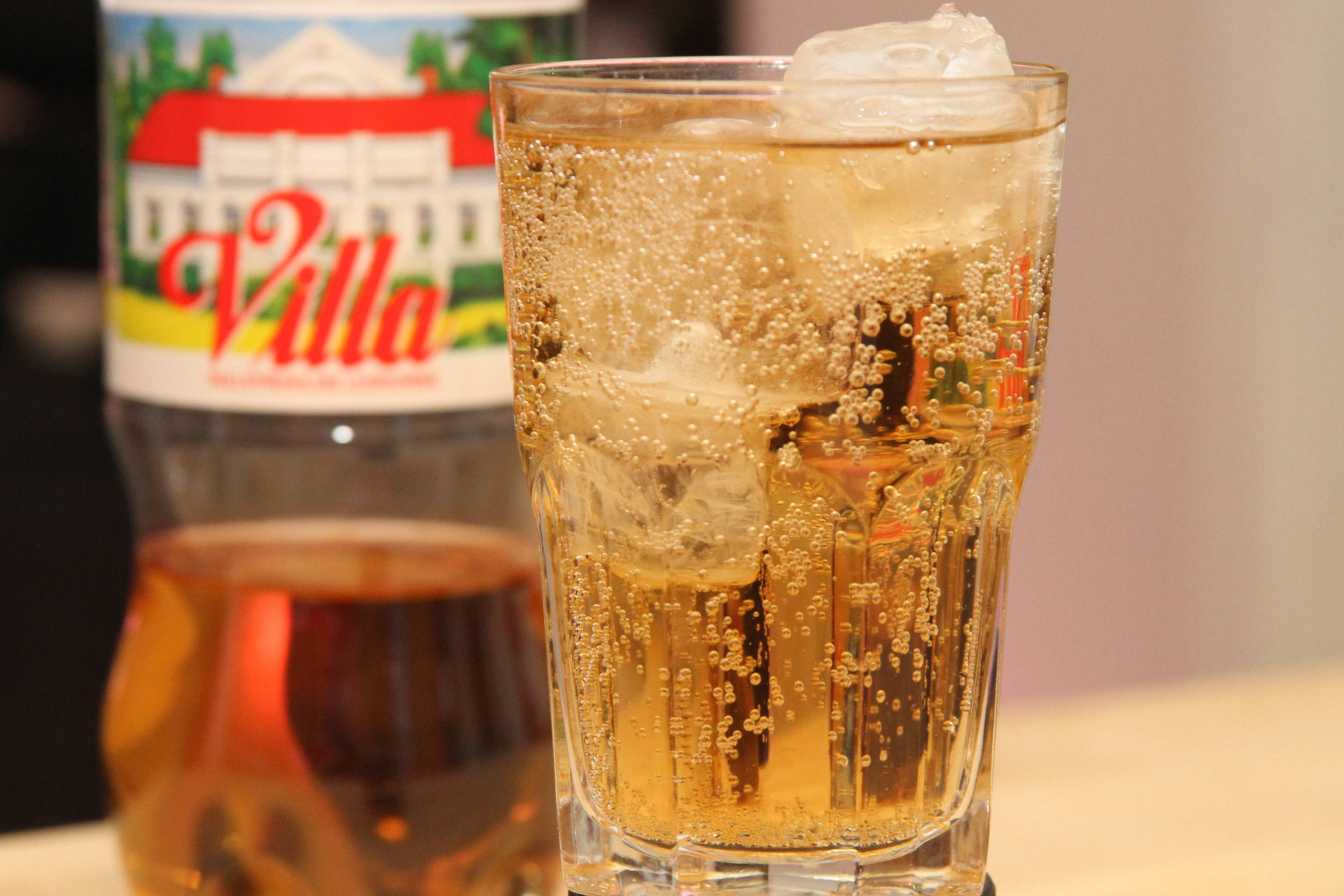 Villa, en norsk brus.